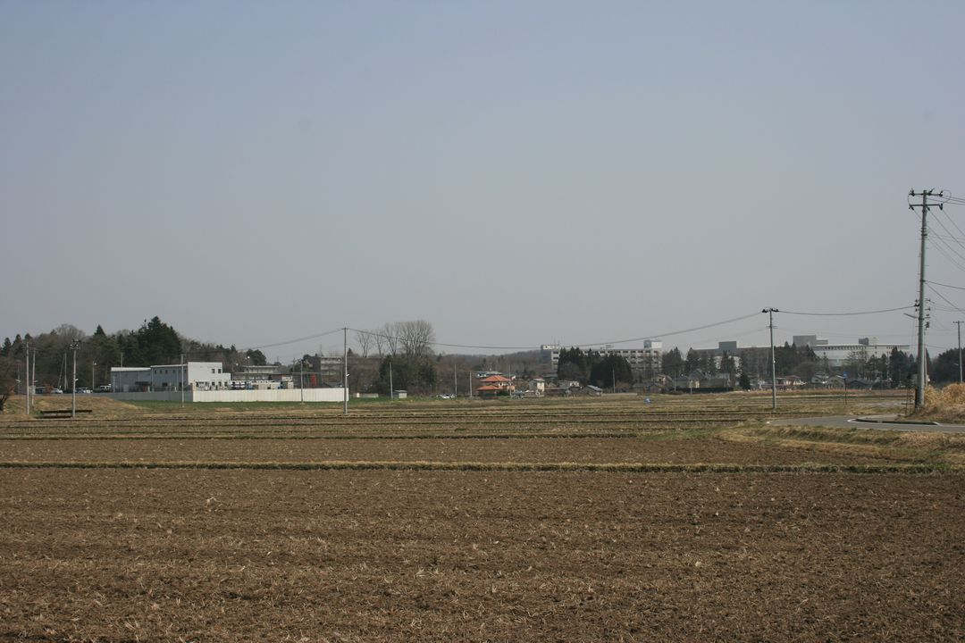 ジェイアールバス関東株式会社白河支店の外観。公道より敷地外撮影。奥に見える高層の建物は、東日本旅客鉄道総合研修センター